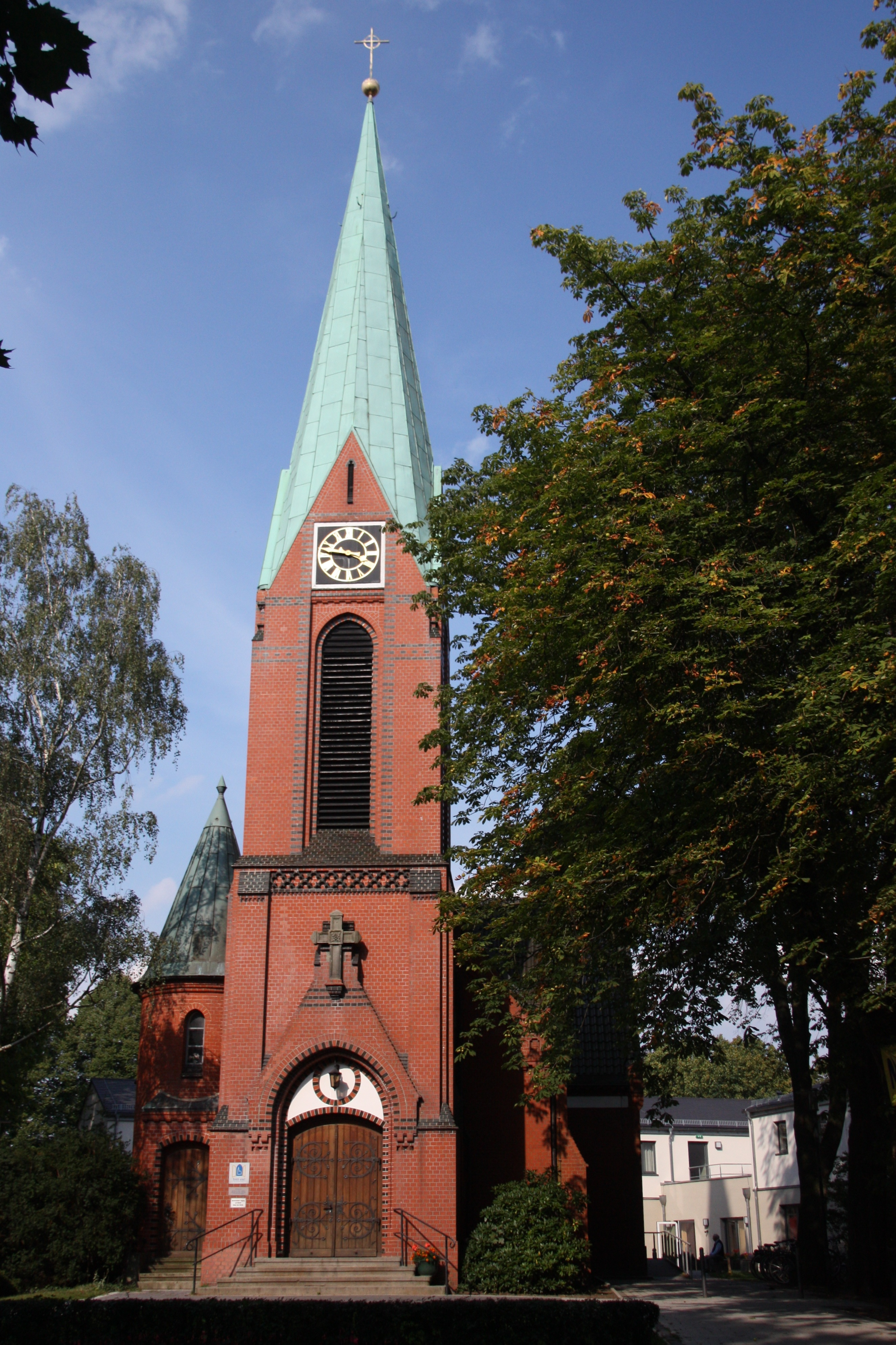 Kirche im alten Dorfkern von Hamburg-Eidelstedt, Elisabethkirche